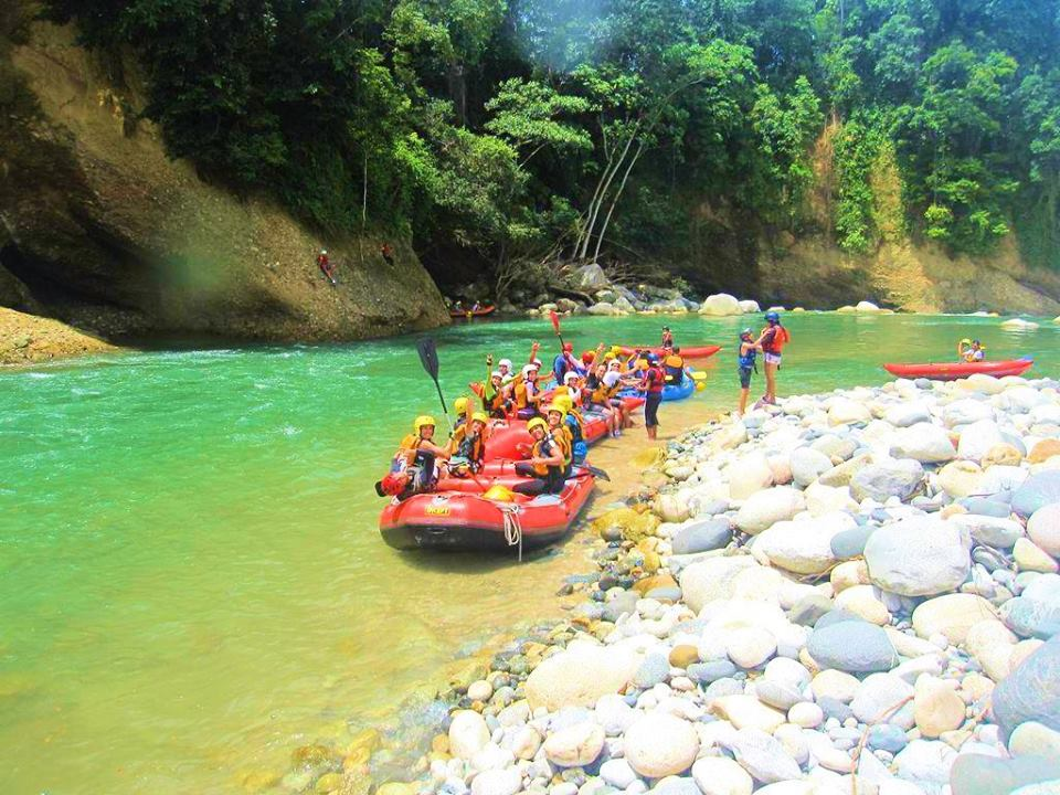 Río la acequia Barinas, uno de los mejores ríos a nivel mundial para practicar el deporte Rafting.